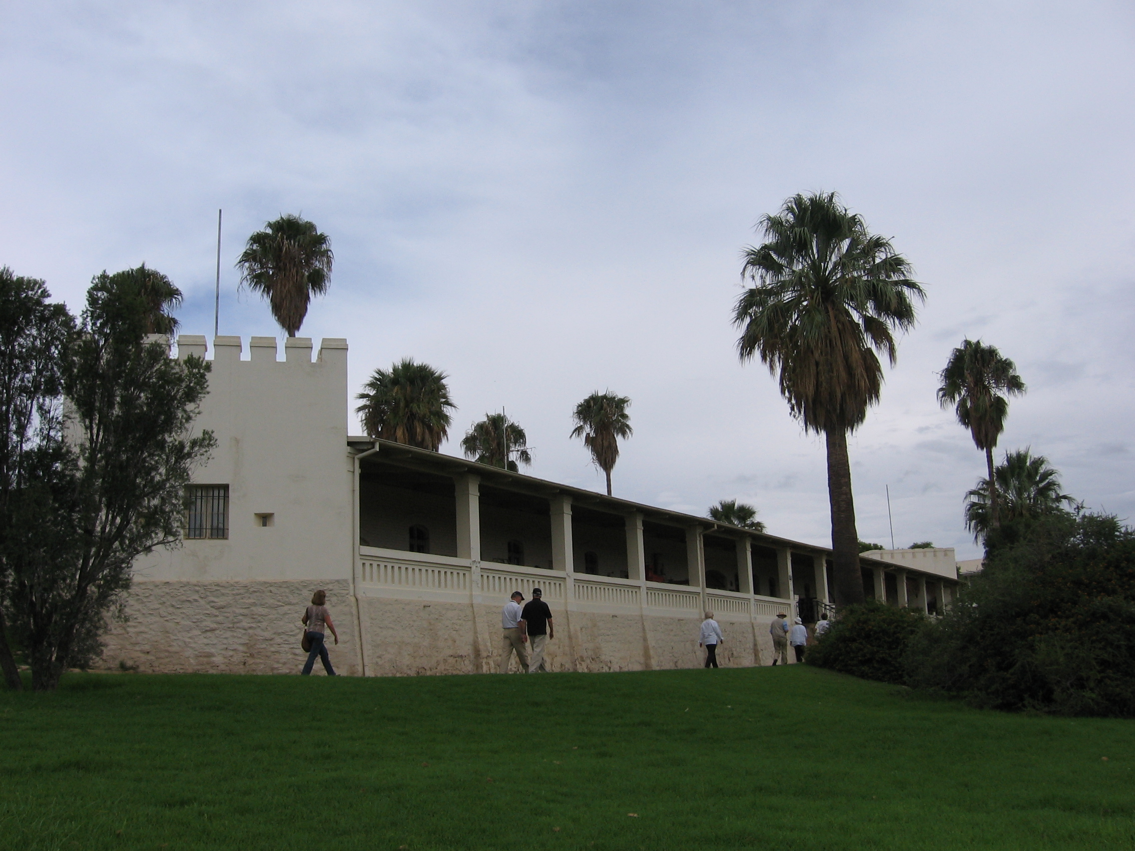 Alte Feste Windhoek (exterior)